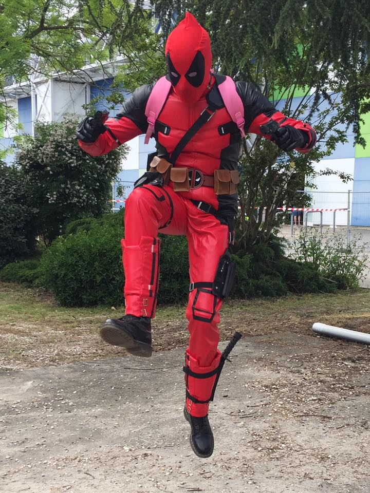 Cosplayeur Deadpool au BGF2016